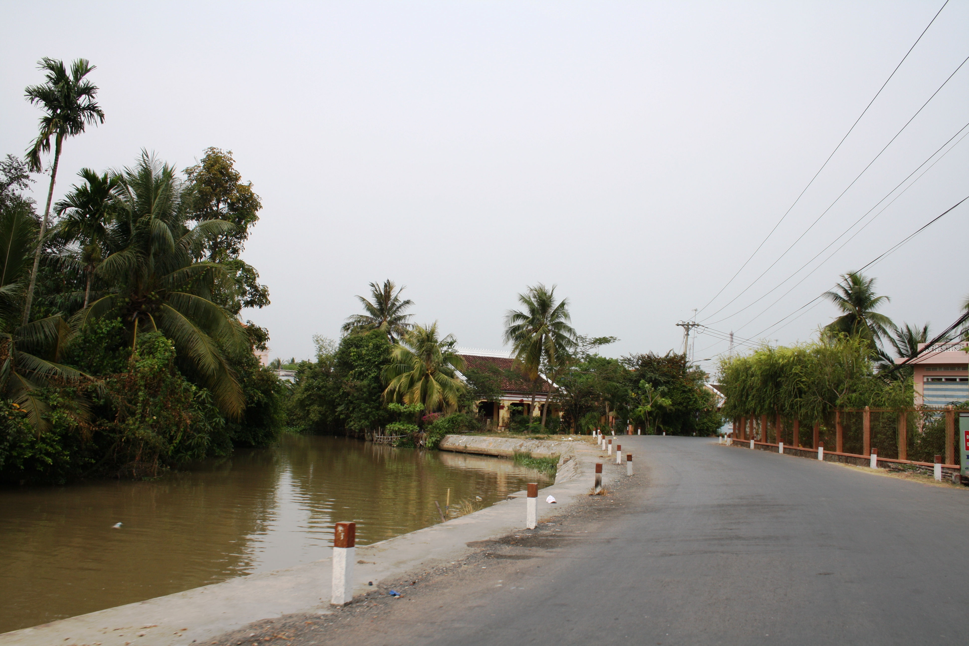 Vĩnh Hựu, Gò Công Tây, Tiền Giang, Việt Nam